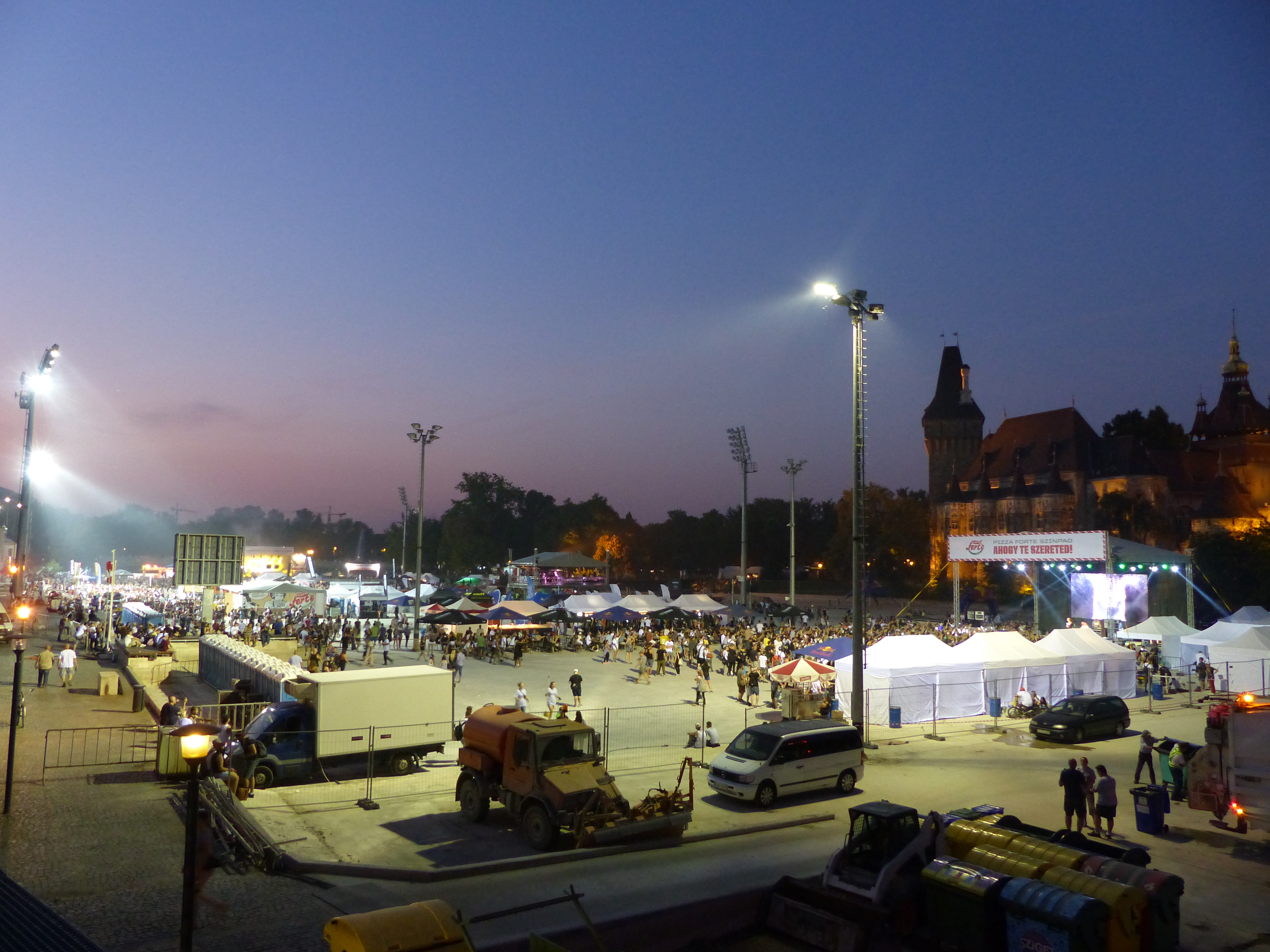 OSG17 Extrémsport Fesztivál. A felvételek 2016. szeptember 10-én készültek a Városligeti Műjégpályán. A meghirdetett program: MVMSZÍNPAD:10.00Sportok,Nevezés10.45Inlinegyakorlás11.10Sportok, InlineselejtezőJam12.00Koncert:NB12.30Skateboardselejtező14.00BMXparkgyakorlás14.15BMXparkselejtező15.00Koncert:SiskaFinuccsi15.40Koncert:Deniz19.00Koncert:Hősök19.30Koncert:Brigád:Killakikitt+NKS20.40Eredményhirdetés21.00 Koncert: The End Show PIZZA FORTE SZÍNPAD: 10.45Regisztráció-nevezés(Break,Beatbox,Freestyle)10.30Beatboxselejtező14.20 Beatbox döntő 17.15Breakbattle13.45Koncert:MikeeMykanic14.55Koncert:Funktasztikus16.35 Koncert: Beerseewalk 18.00Koncert:TKYD18.30Koncert:Barbárfivérek19.10Koncert:DSP20.20Koncert:AKPH19.40 Break döntő – Break ikon díj Források